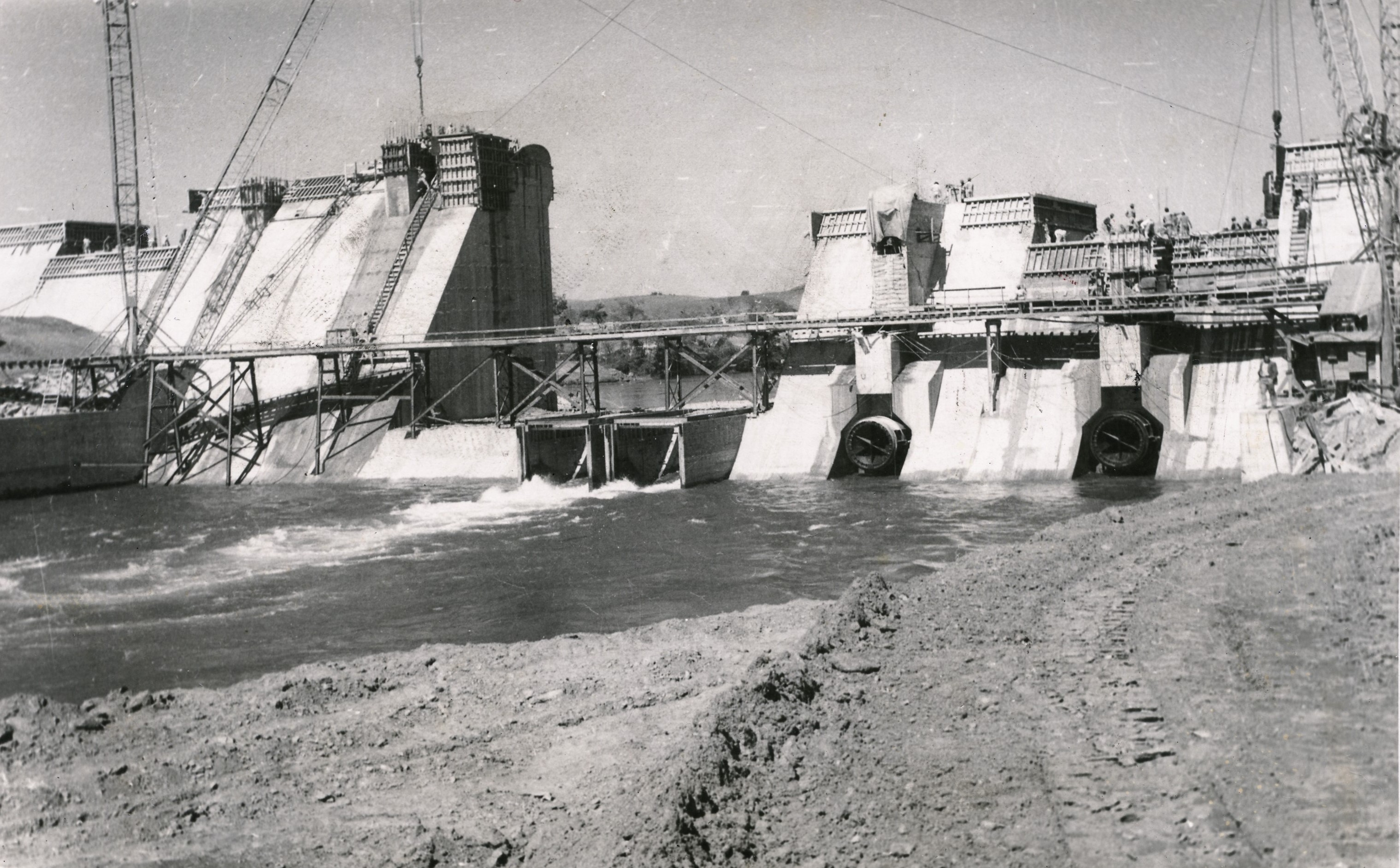 Fotografia do Fundo Correio da Manhã, sob a guarda do Arquivo Nacional.